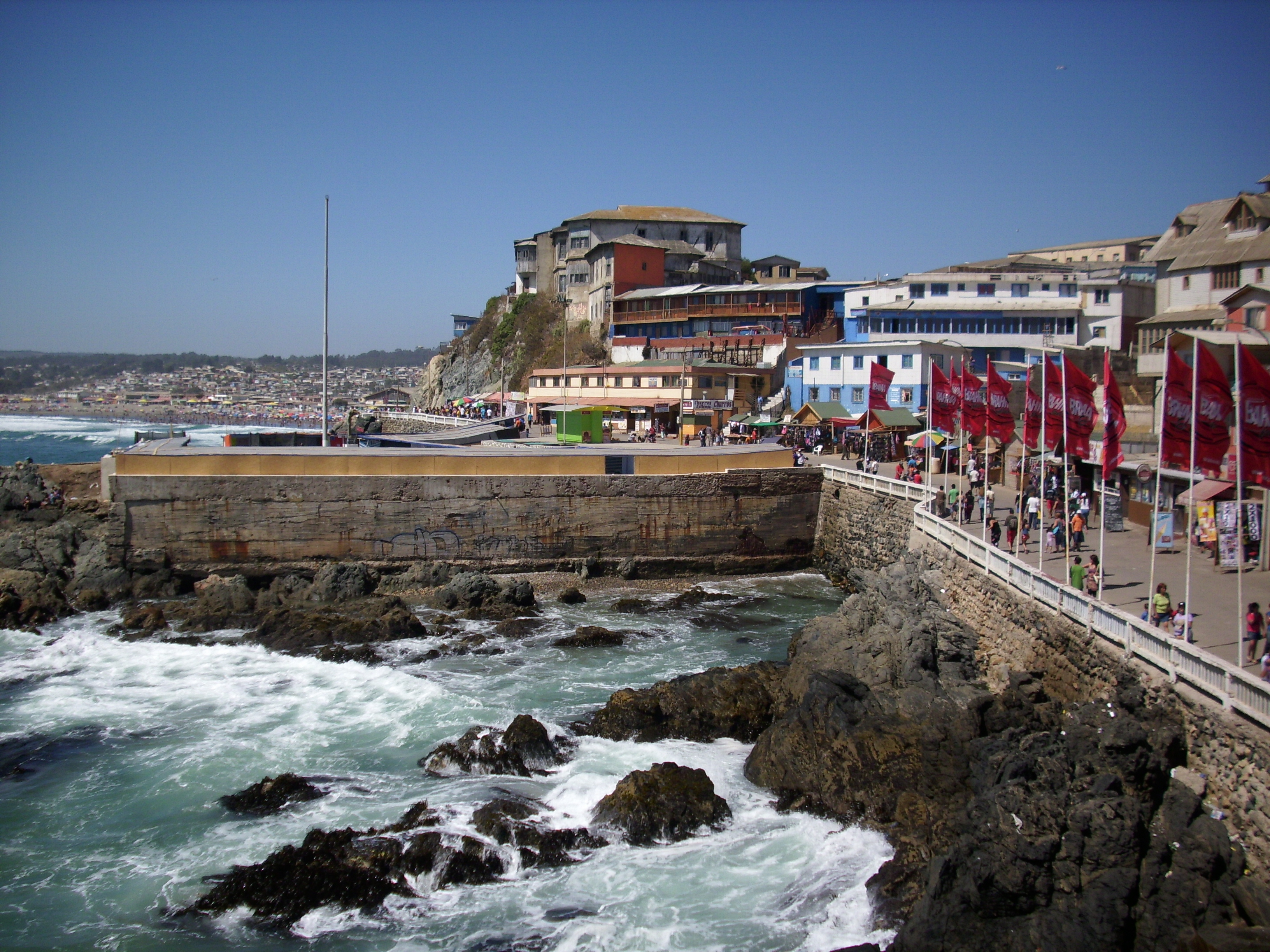 La Terraza de Cartagena vista desde el altar de la Virgen de Los Suspiros. V Región de Valparaíso, Provincia de San Antonio, Chile.